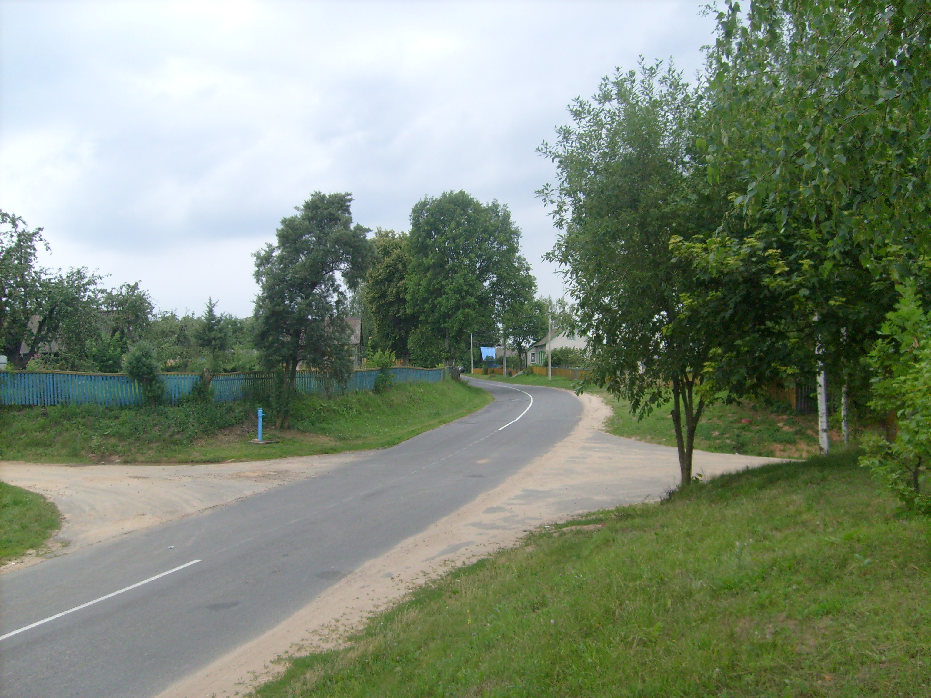 Агрогородок Княжицы (Могилёвский район), улица проходящая напротив костёла